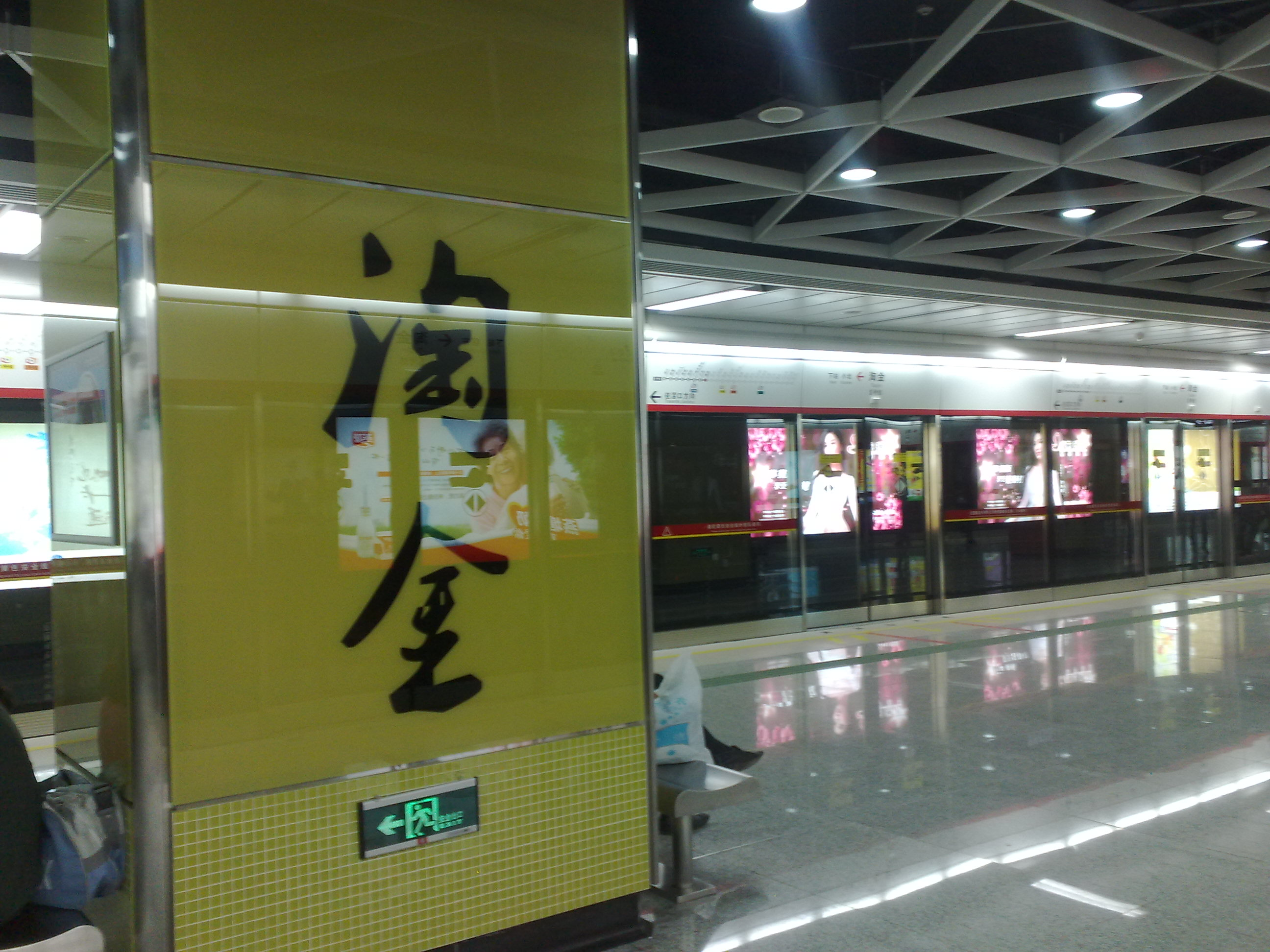 中文（香港）: 廣州地鐵淘金站站台